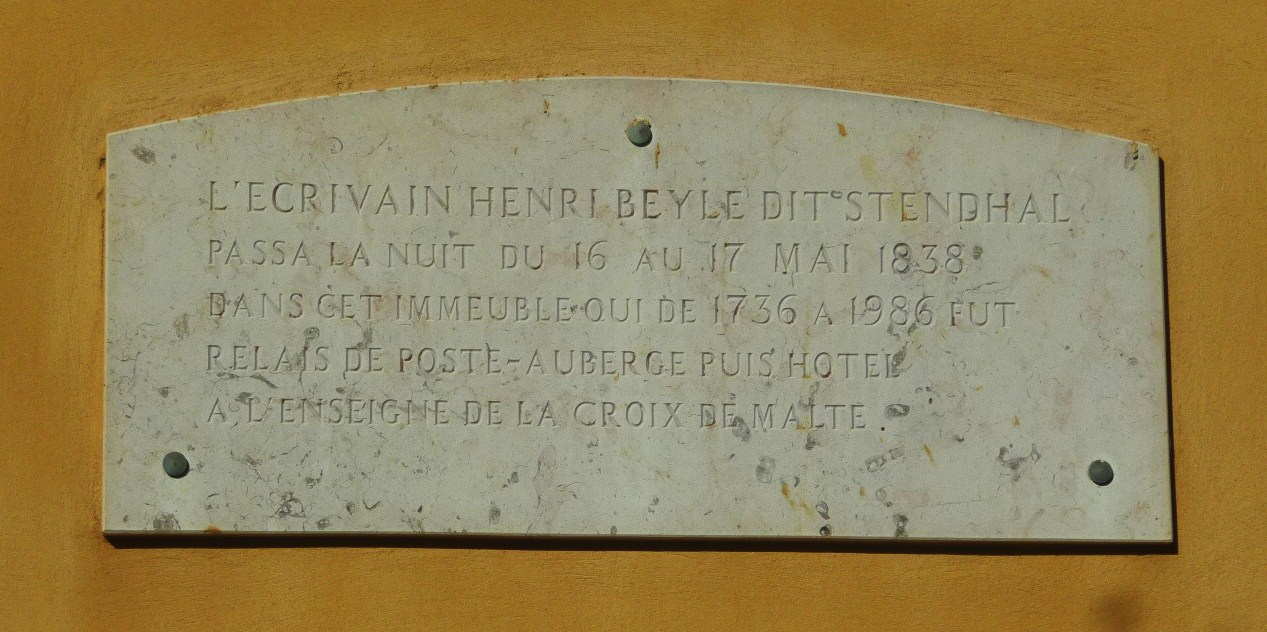 Plaque apposée en mémoire du séjour de Stendhal à La Ciotat (France)